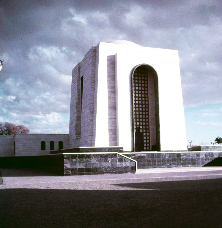 Mausolée de Reza Chah à Ray (1950-1979)